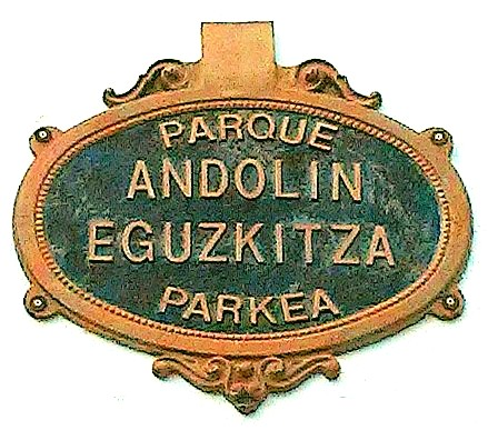 Andolin Eguzkitza hizkuntzalariaren omenezko parkeko kartela Santurtzin